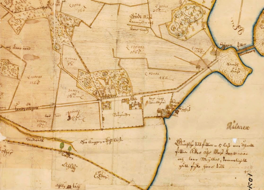 "Fittia gård"